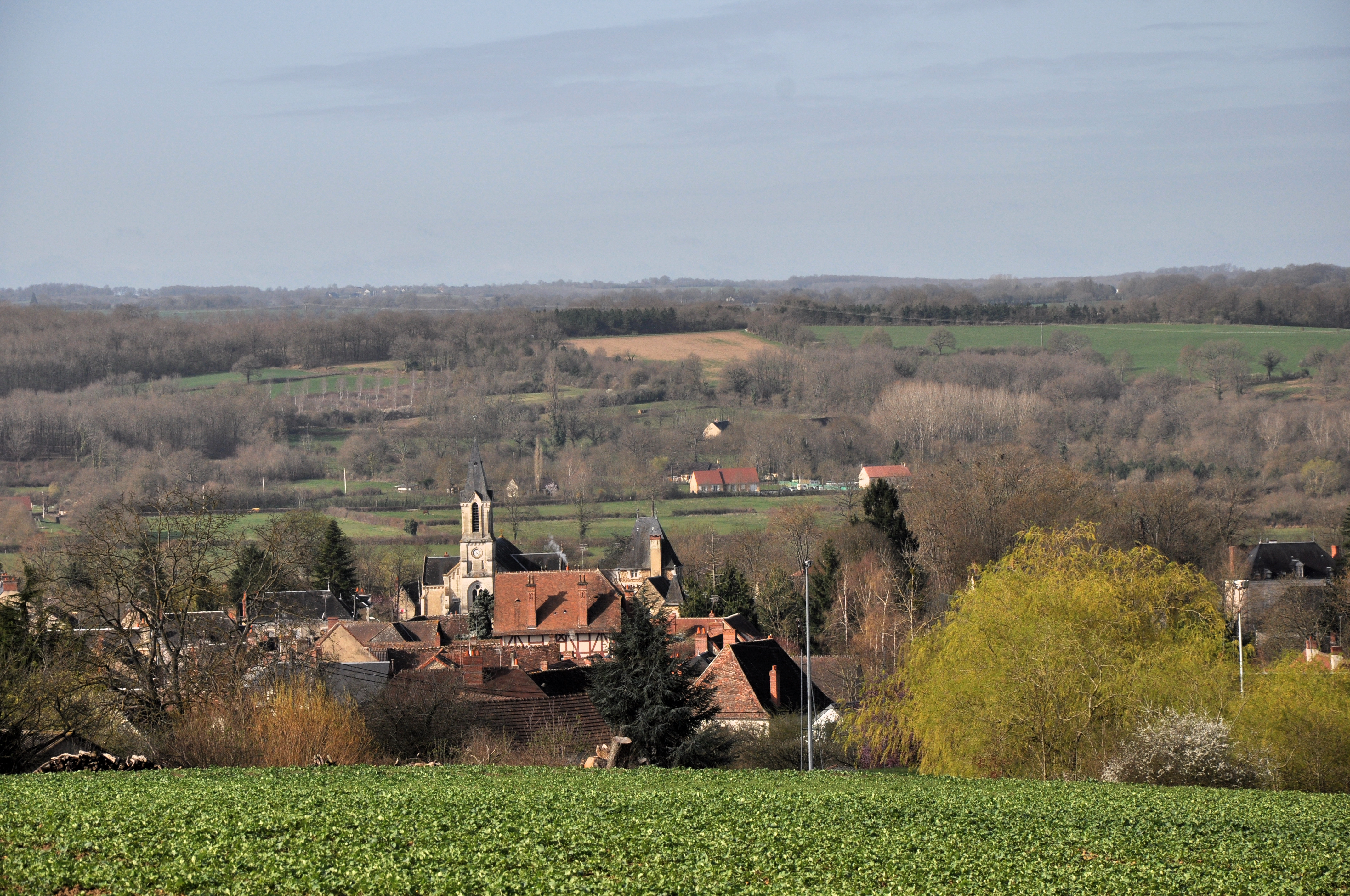 Le Menoux (Indre) - Vue générale